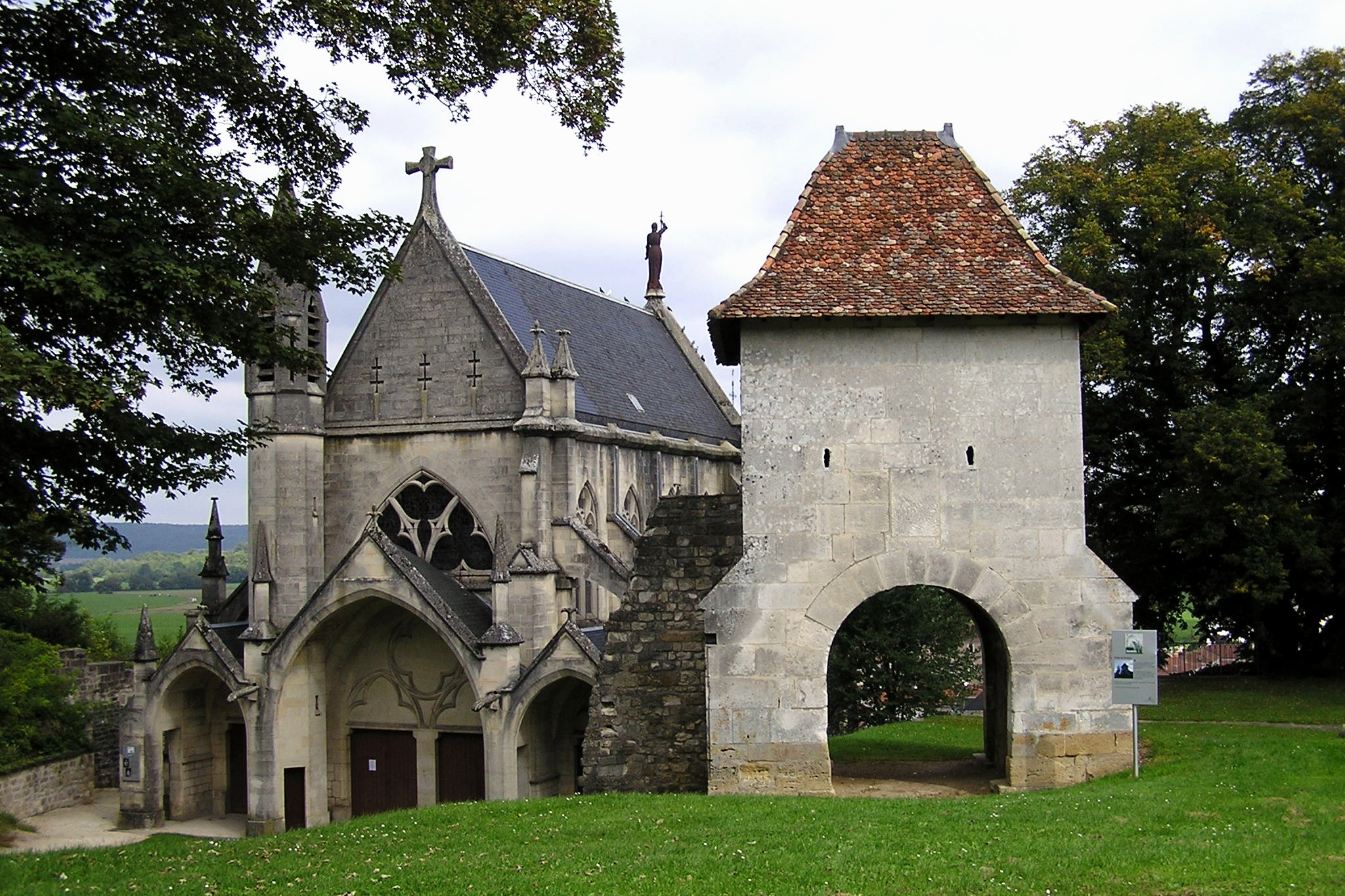 chapelle castrale Vaucouleurs (Meuse)